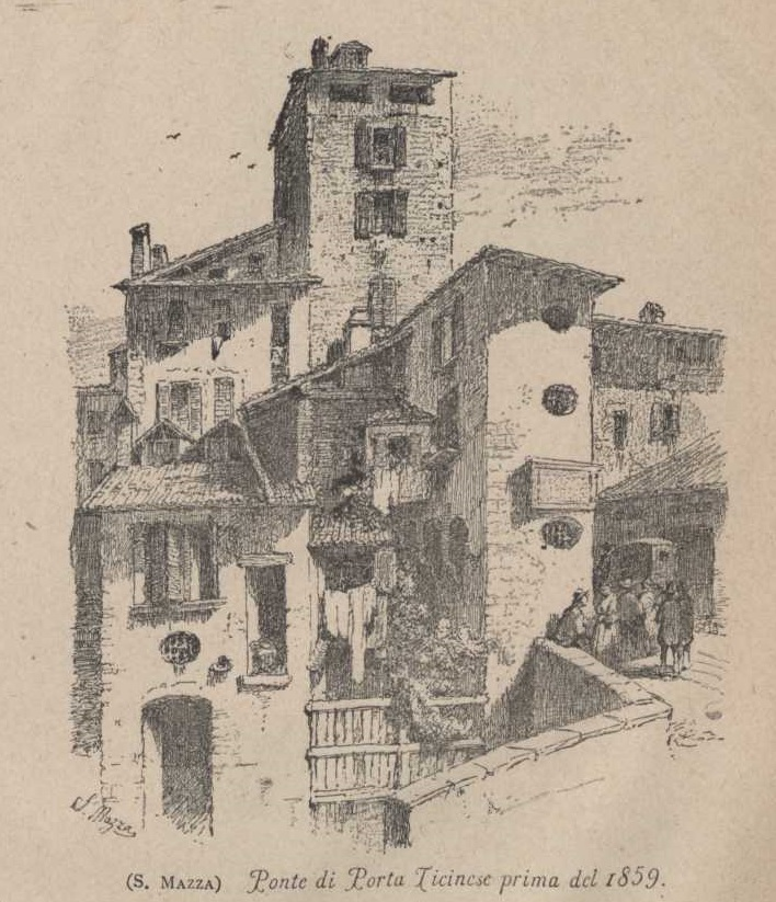 Ponte di Porta Ticinese tratto da l naviglio : strenna del Pio Istituto dei Rachitici di Milano